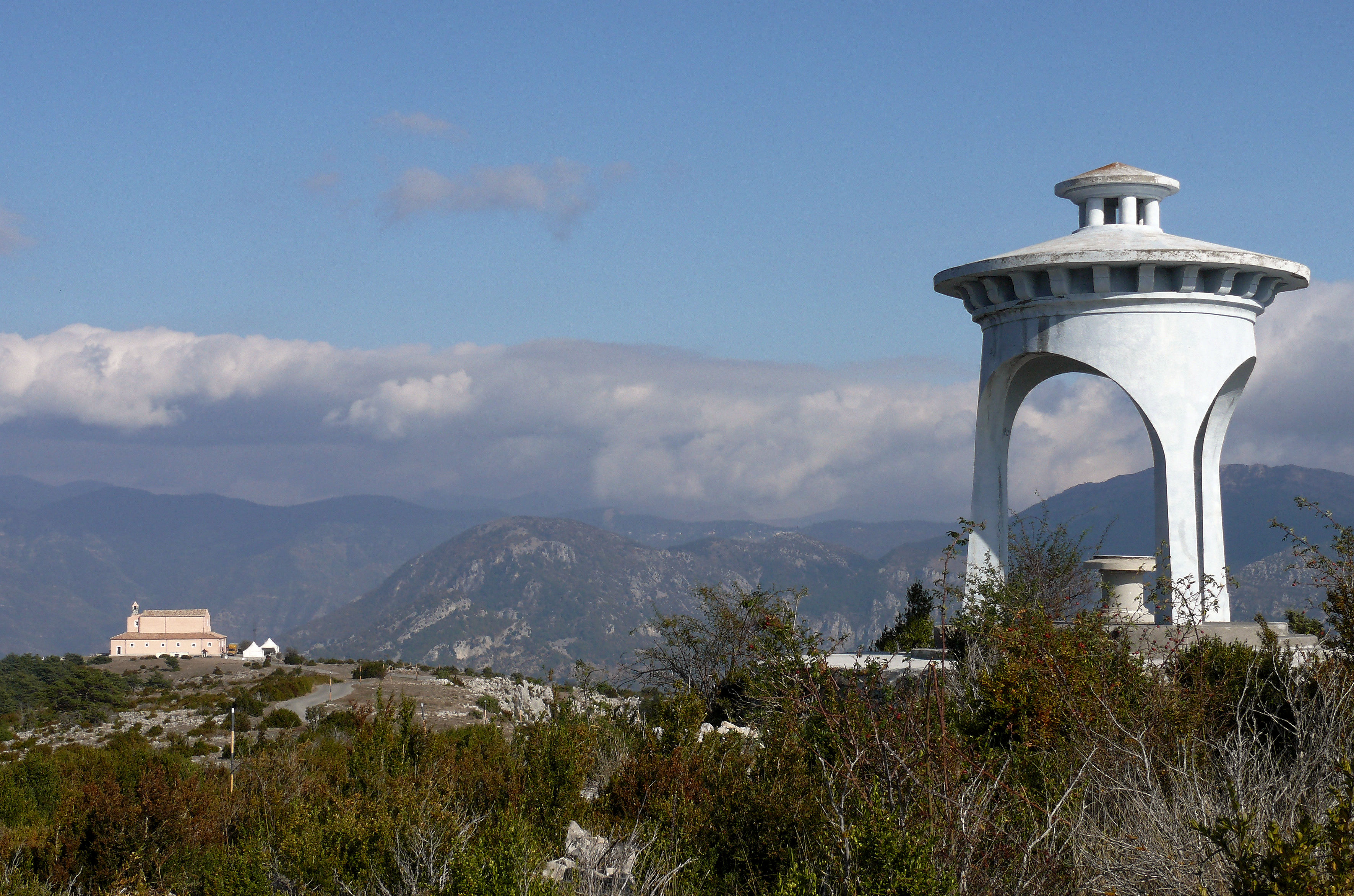 Madone d'Utelle - Point de vue panoramique et sanctuaire